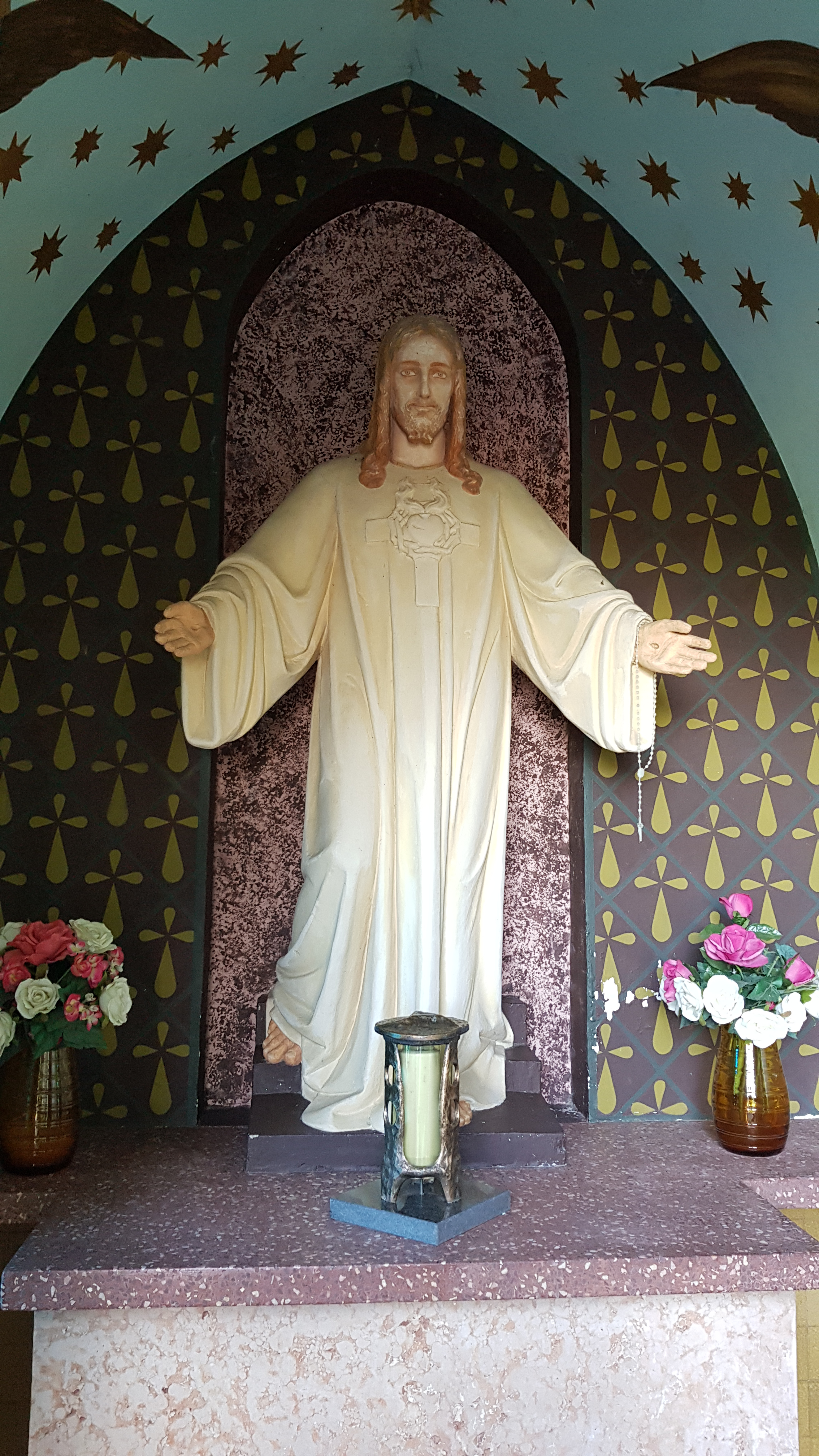 Heilig-Hartkapel ten noorden van Mechelen, Limburg, Nederland